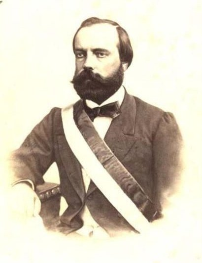 Mariano Ignacio Prado (1826-1901), Presidente del Perú